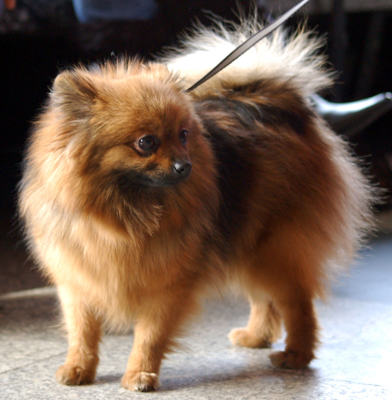 Szpic_miniaturowy